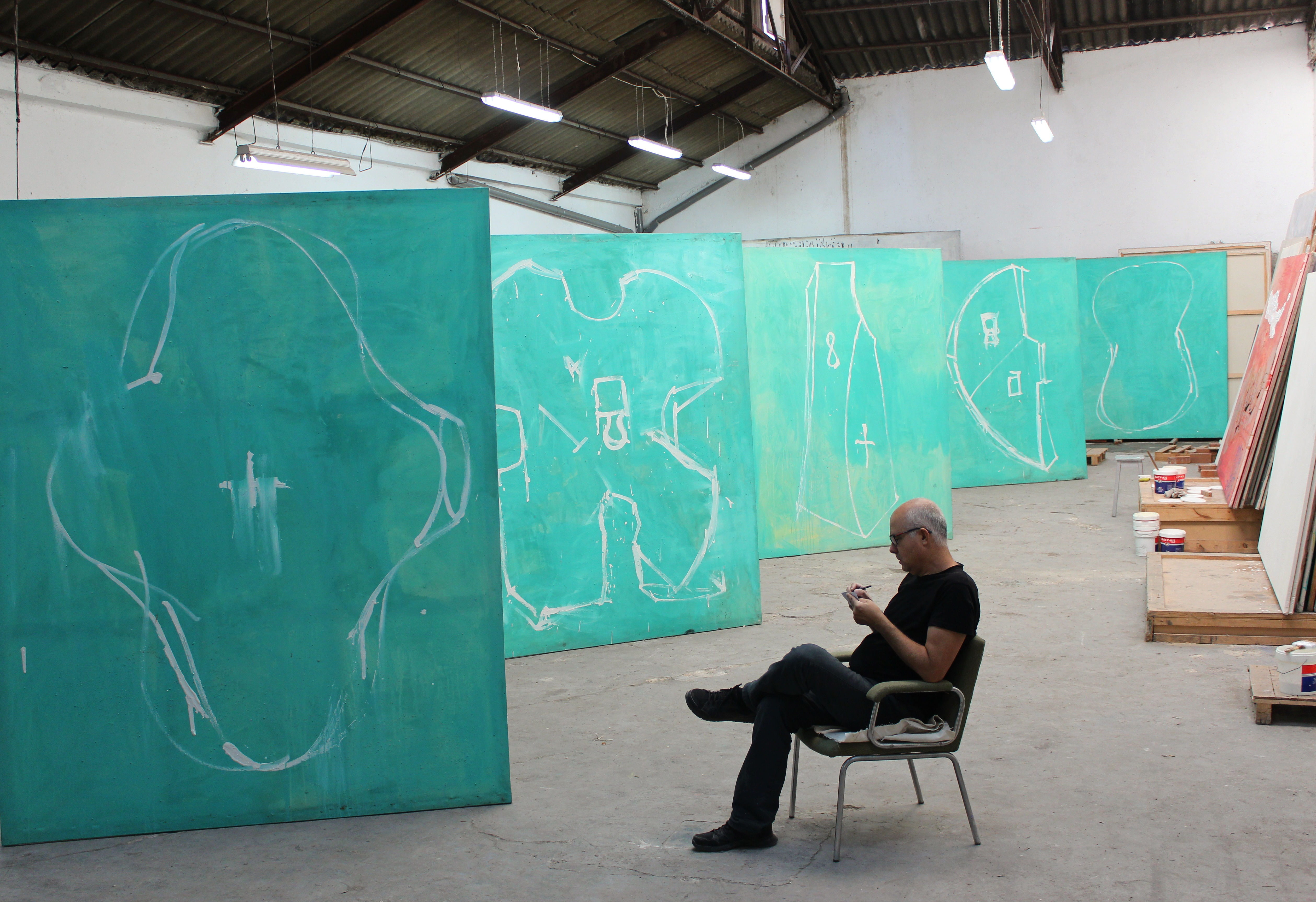 AP